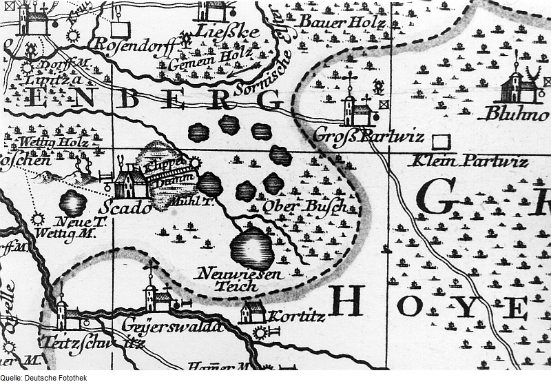 Original image description from the Deutsche Fotothek Elsterheide-Skado. Karte des Amtes Senftenberg, von Schenk, 1757 (Sign.: VII 105)